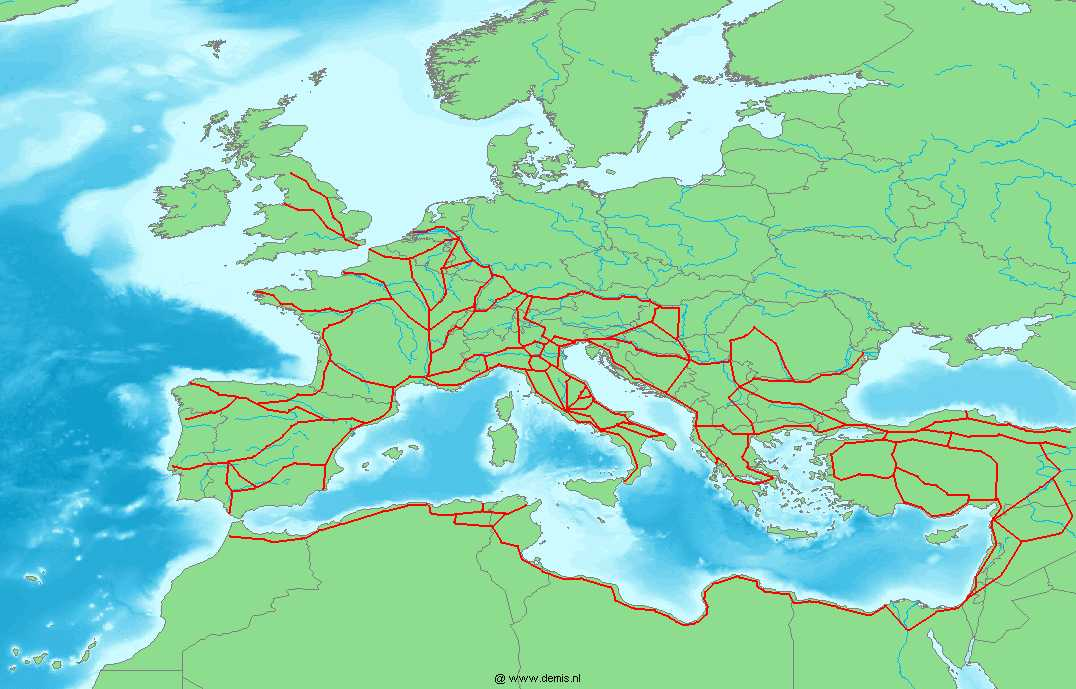 Karte Hauptstraßen im Römischen Reich